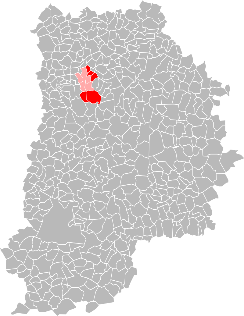 Localisation des 5 communes historiques au sein de Val d'Europe Agglomération.